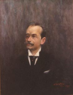 Obra da coleção Brasiliana Iconográfica.